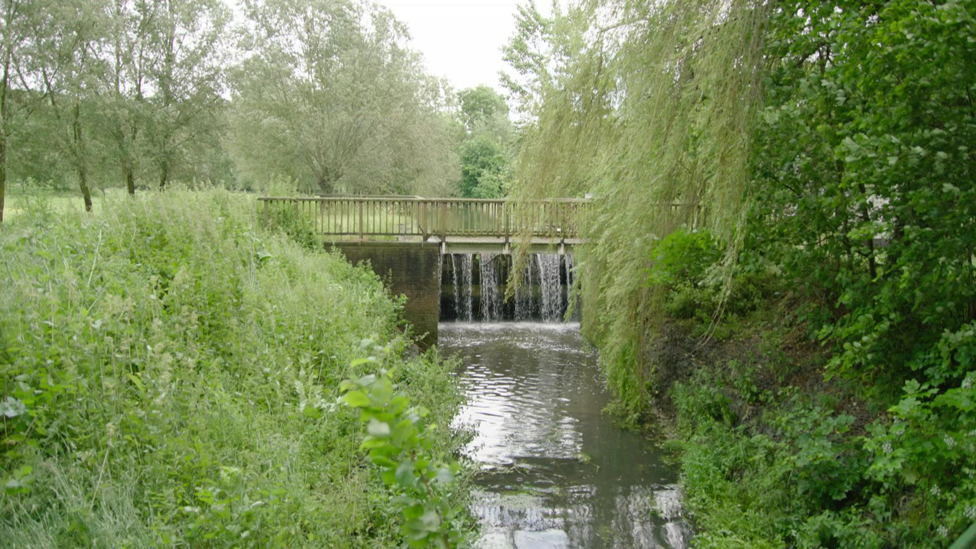 De sluis van Klein Zwitserland in Zwalm